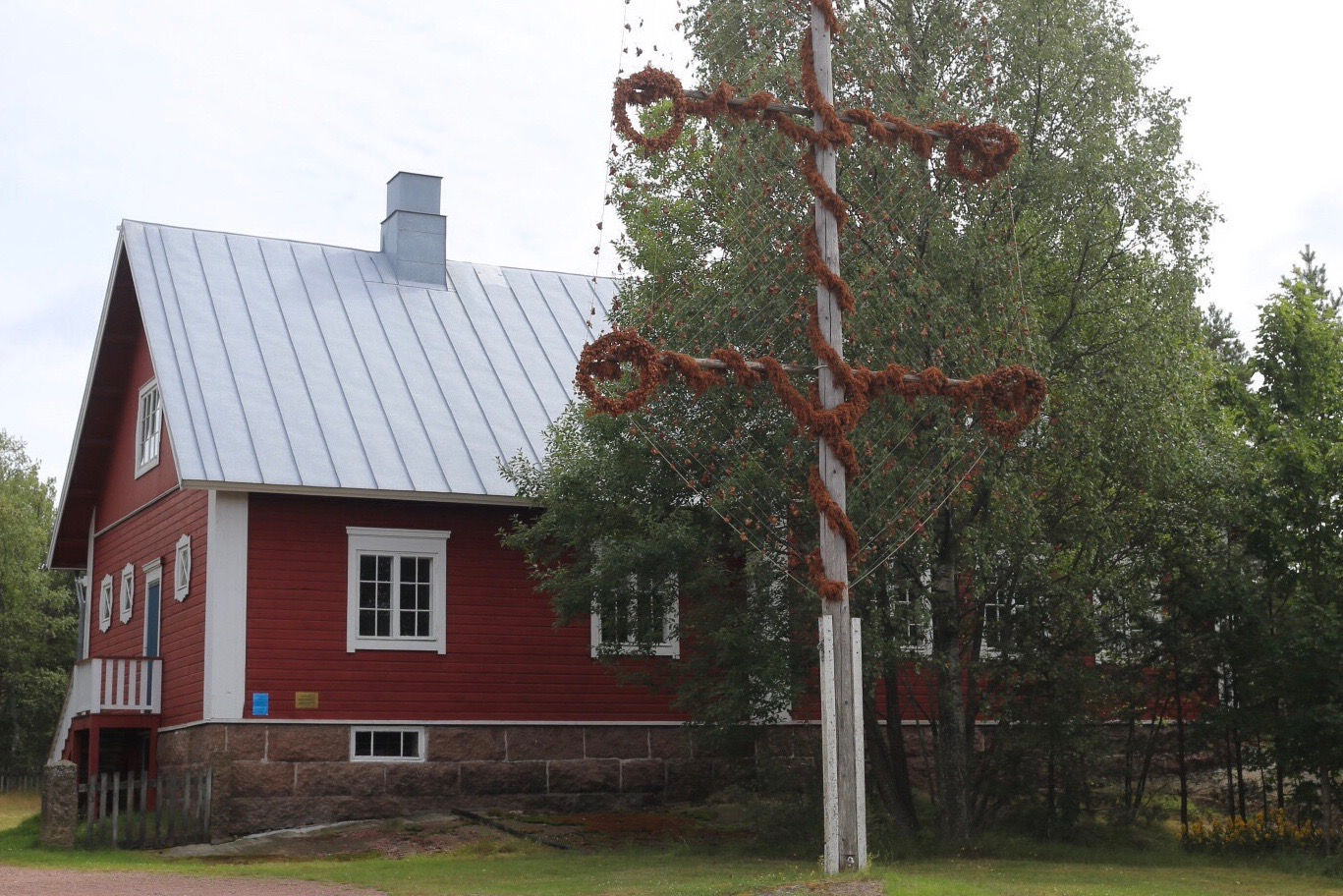 Vapaapalokunnan talo Föglön Degerbyssä. Arkkitehti Lars Sonck.